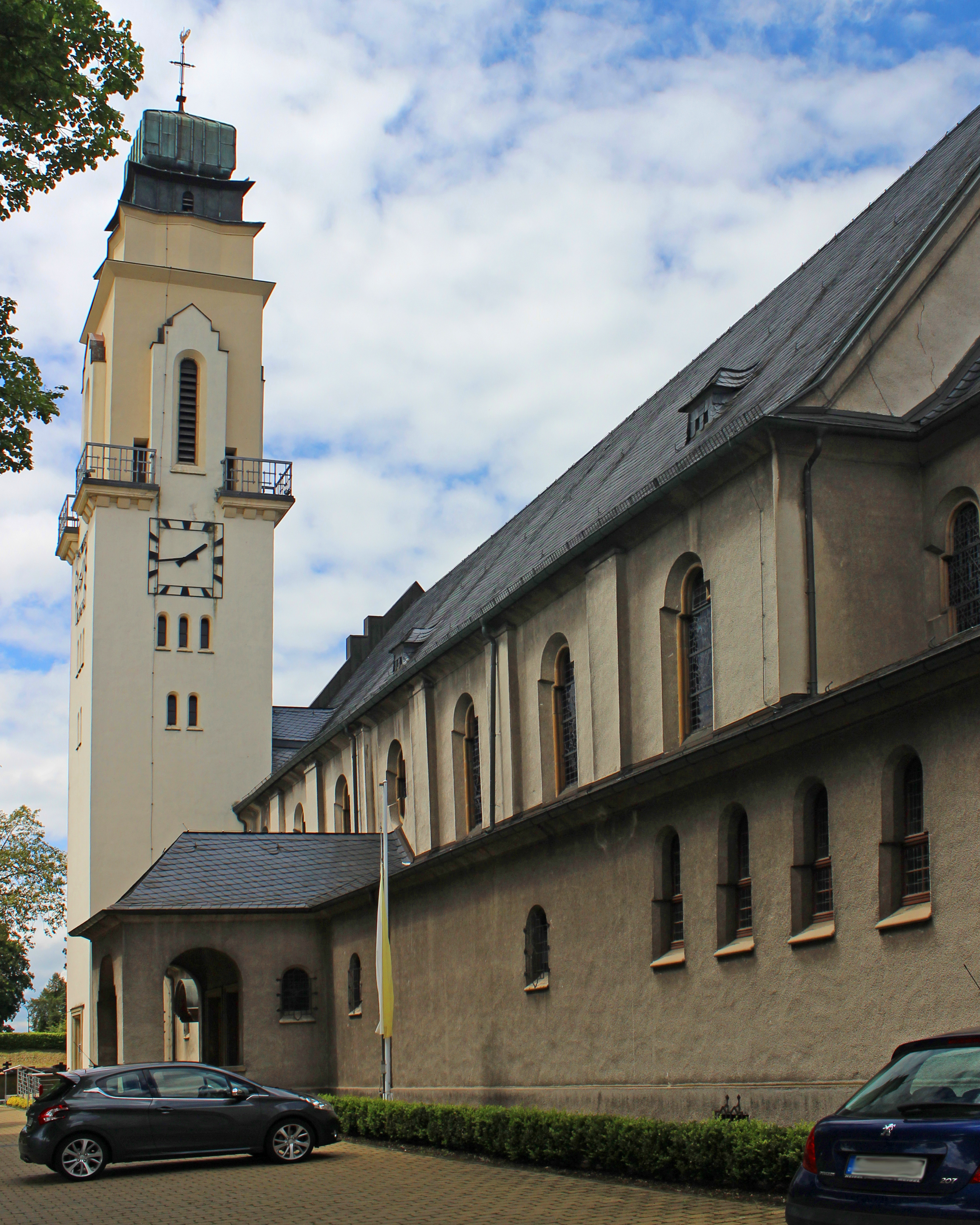 Die katholische Pfarrkirche St. Bonifatius in Überherrn, Landkreis Saarlouis, Saarland